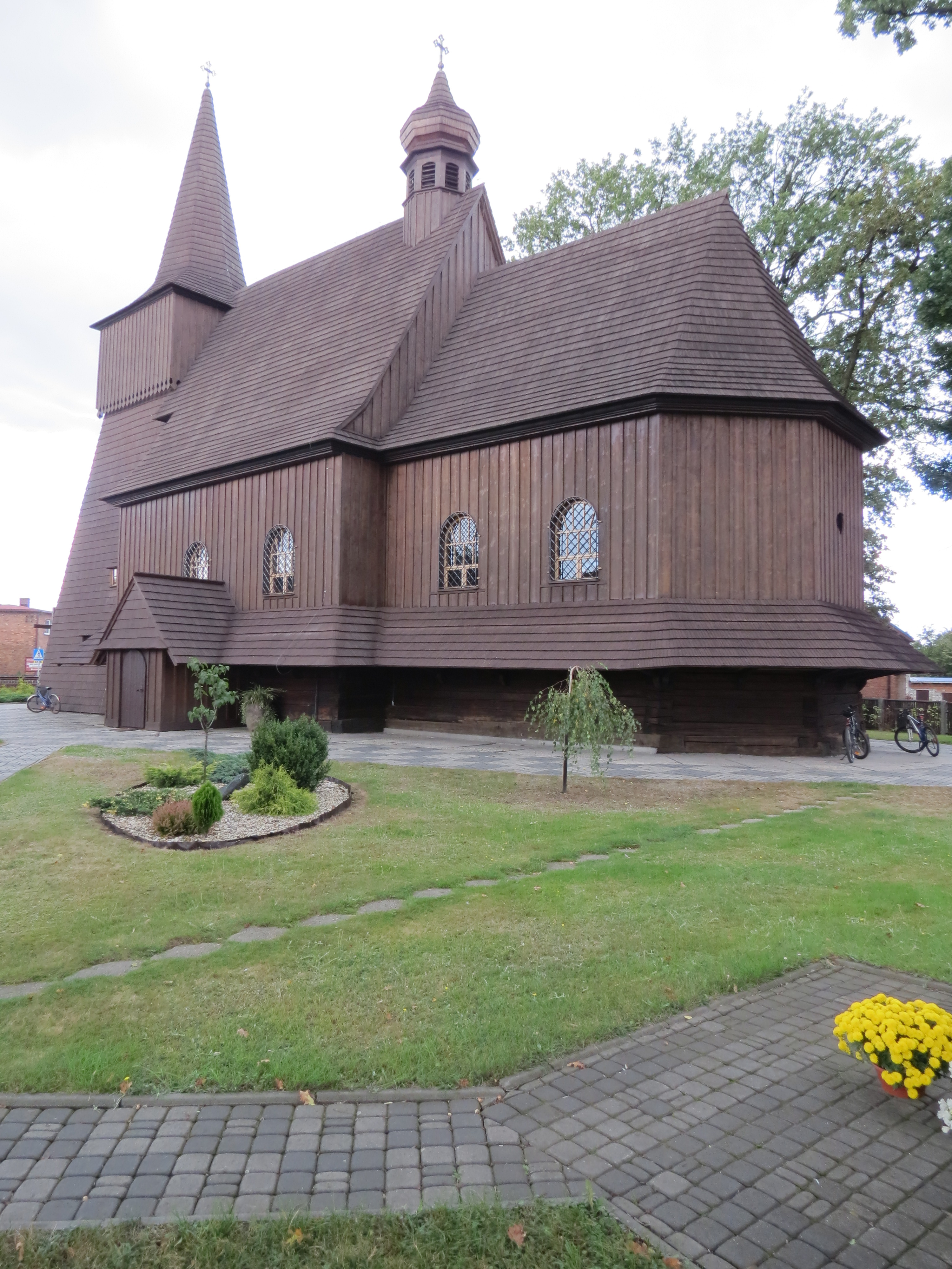 Kościół drewniany p. w. św. Michała Archanioła; Żernica, ul. Miki 3, gmina Pilchowice, powiat gliwicki